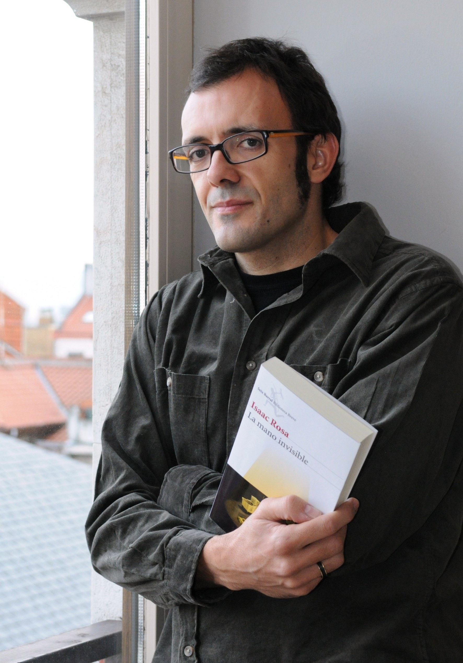 El escritor español Isaac Rosa, en evento organizado por Obra Social Caja Cantabria por su libro "La mano invisible"